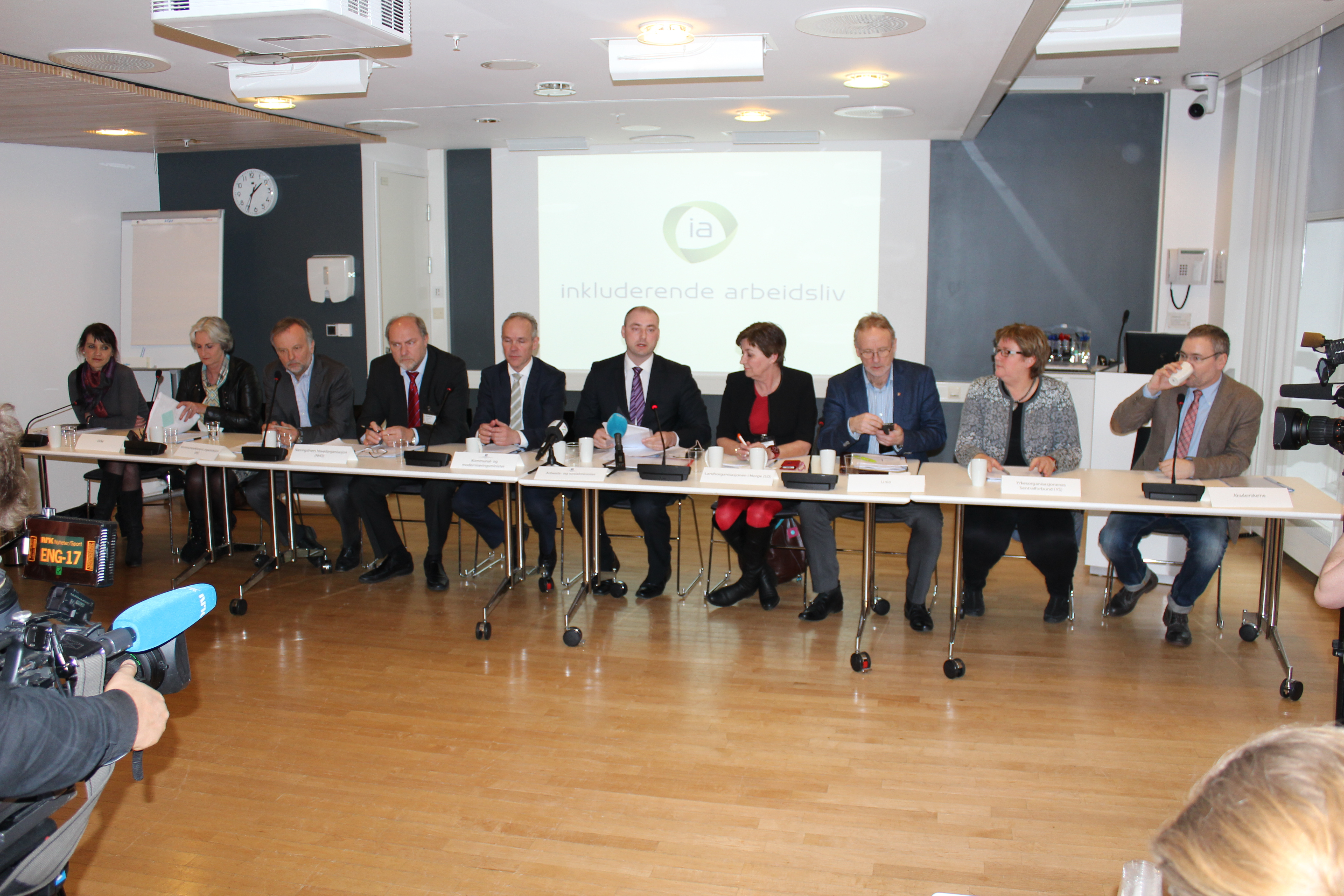 Regjeringen og hovedorganisasjonene i arbeidslivet underskrev 4. mars 2014 ny Intensjonsavtale for et mer inkluderende arbeidsliv (IA-avtalen).[1] Fra venstre: Anne-Kari Bratten, Spekter; Vibeke Madsen, Virke; Per Kristian Sundnes, KS; Svein Oppegaard, NHO; Kommunal- og moderniseringsminister Jan Tore Sanner, Arbeidsminister Robert Eriksson; Gerd Kristiansen, LO; Anders Folkestad, Unio; Jorunn Berland, YS; Knut Aarbakke, Akademikerne.[2]